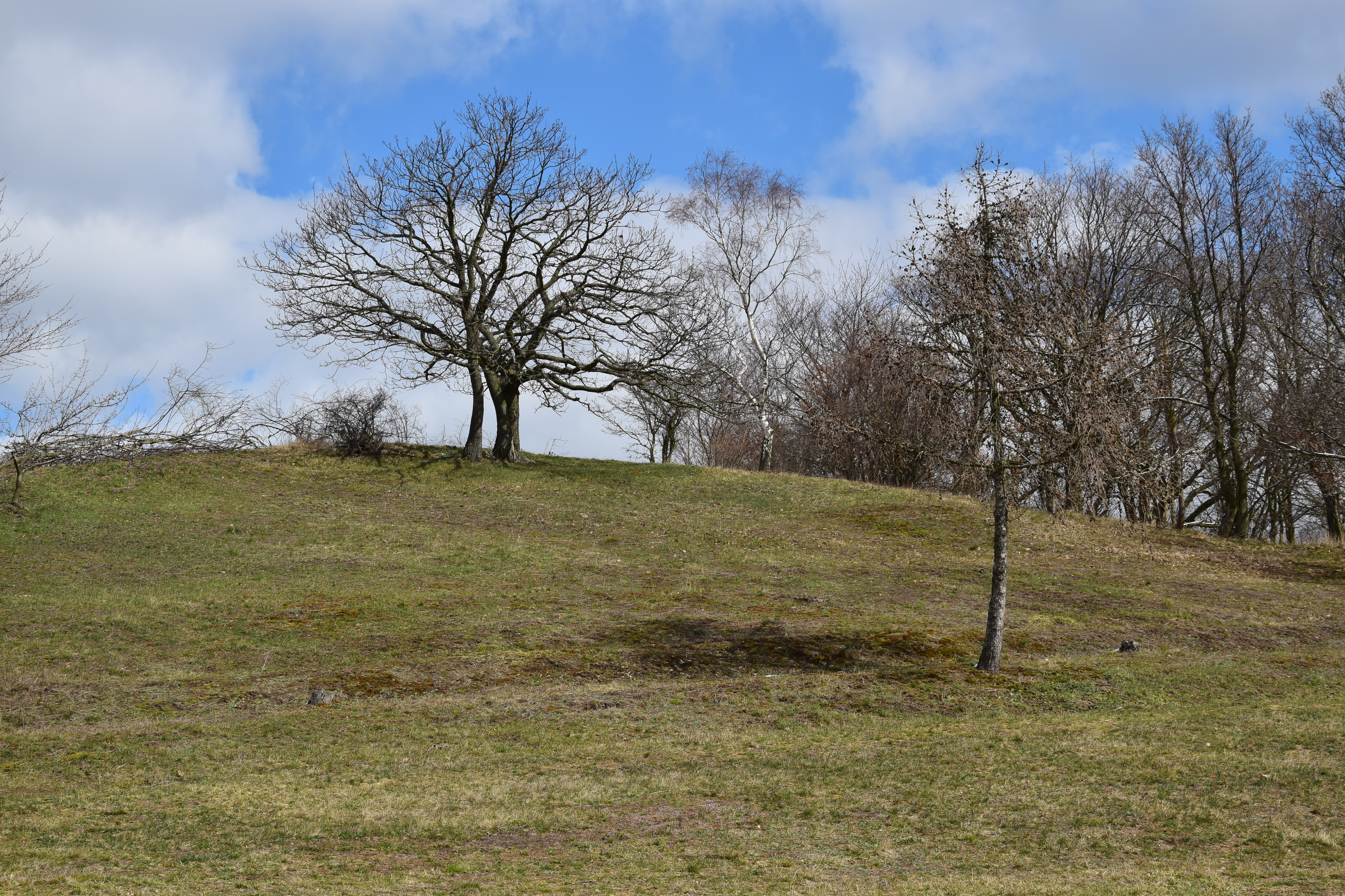 Přírodní památka Krásná Lípa – jižní stráň